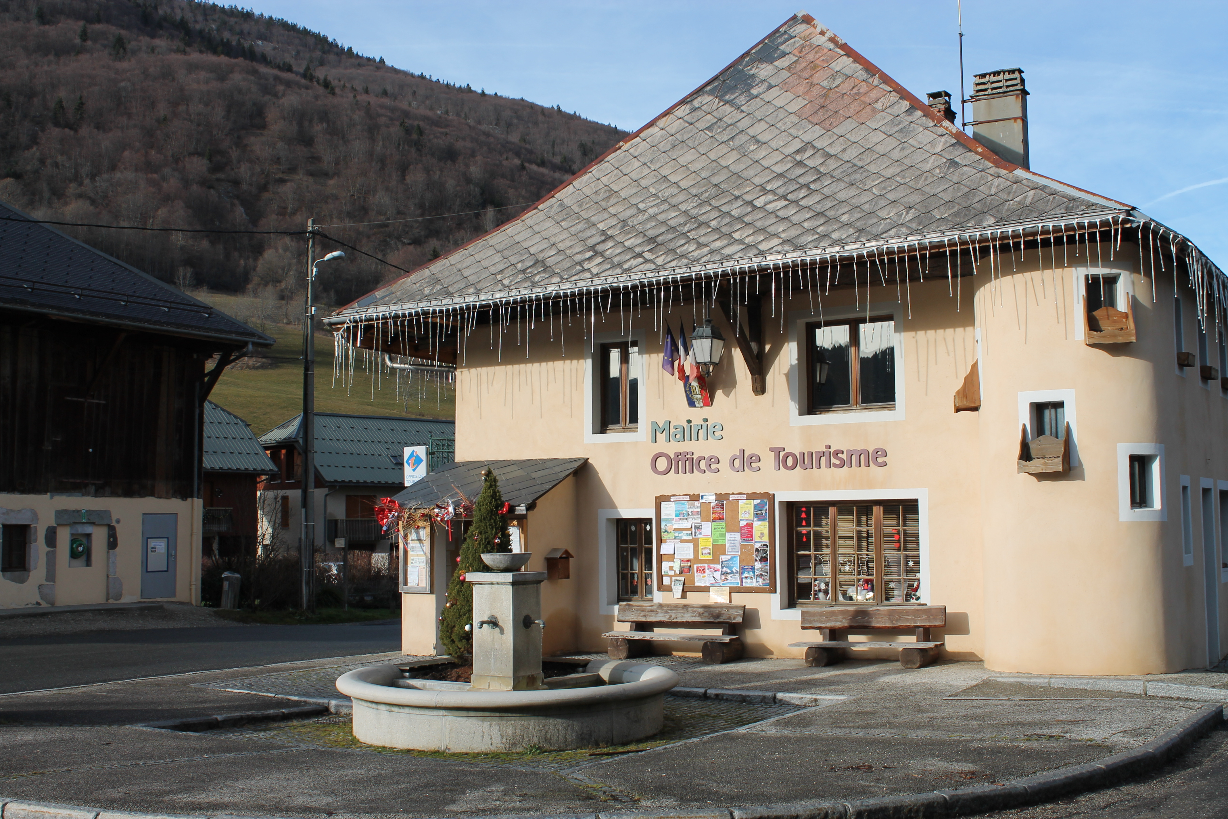 Maire d'Aillon-le-Jeune